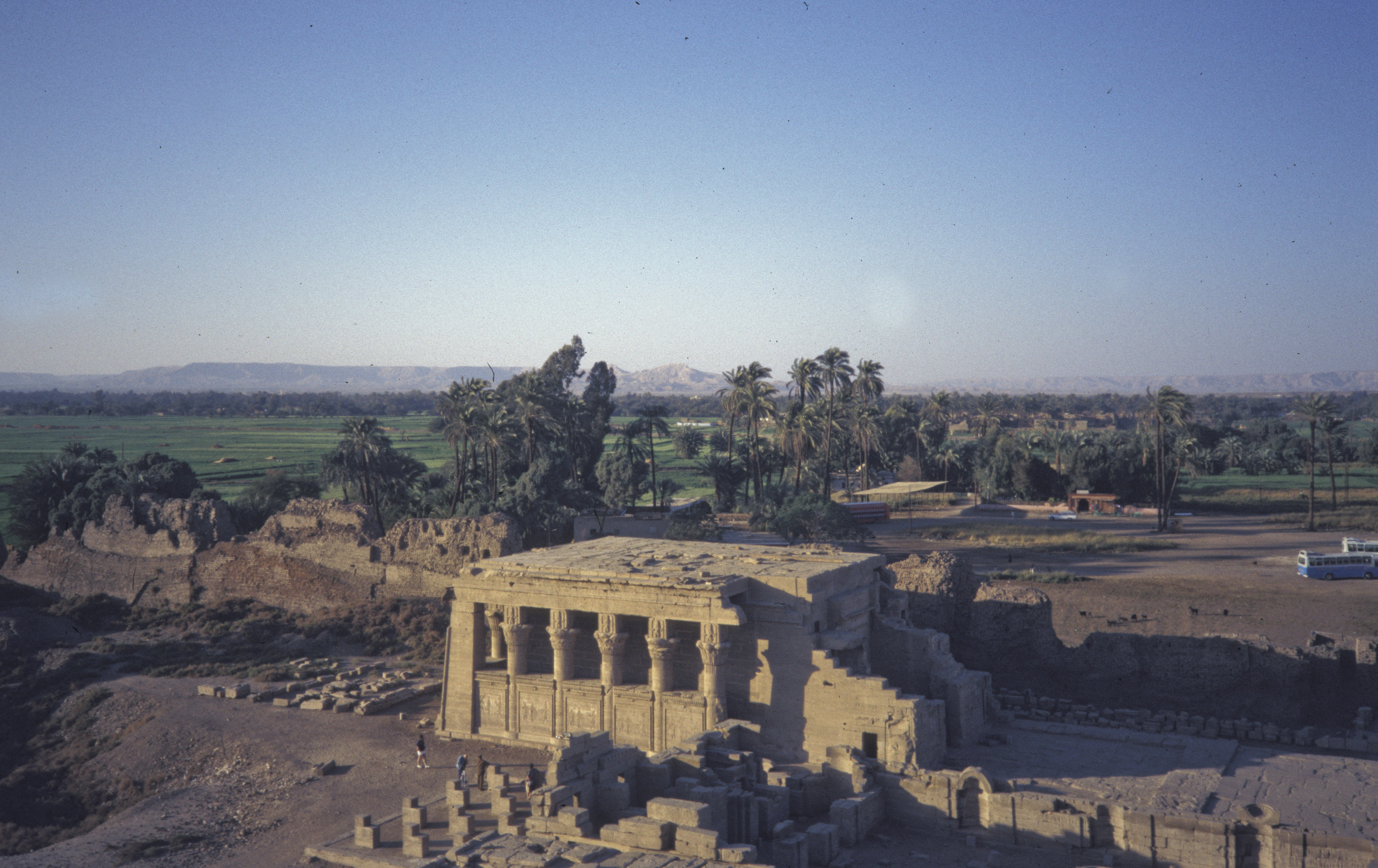 Dendera Temple complex